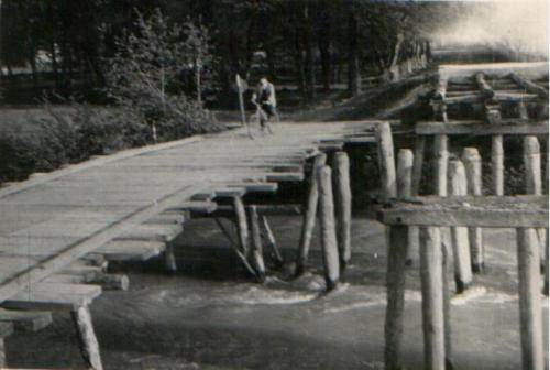 Most w Długopolu na Podhalu